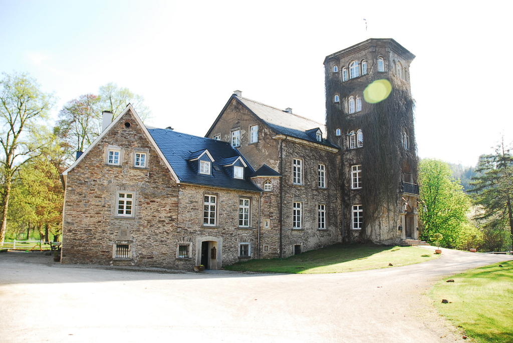 Haus Bamenohl, Front